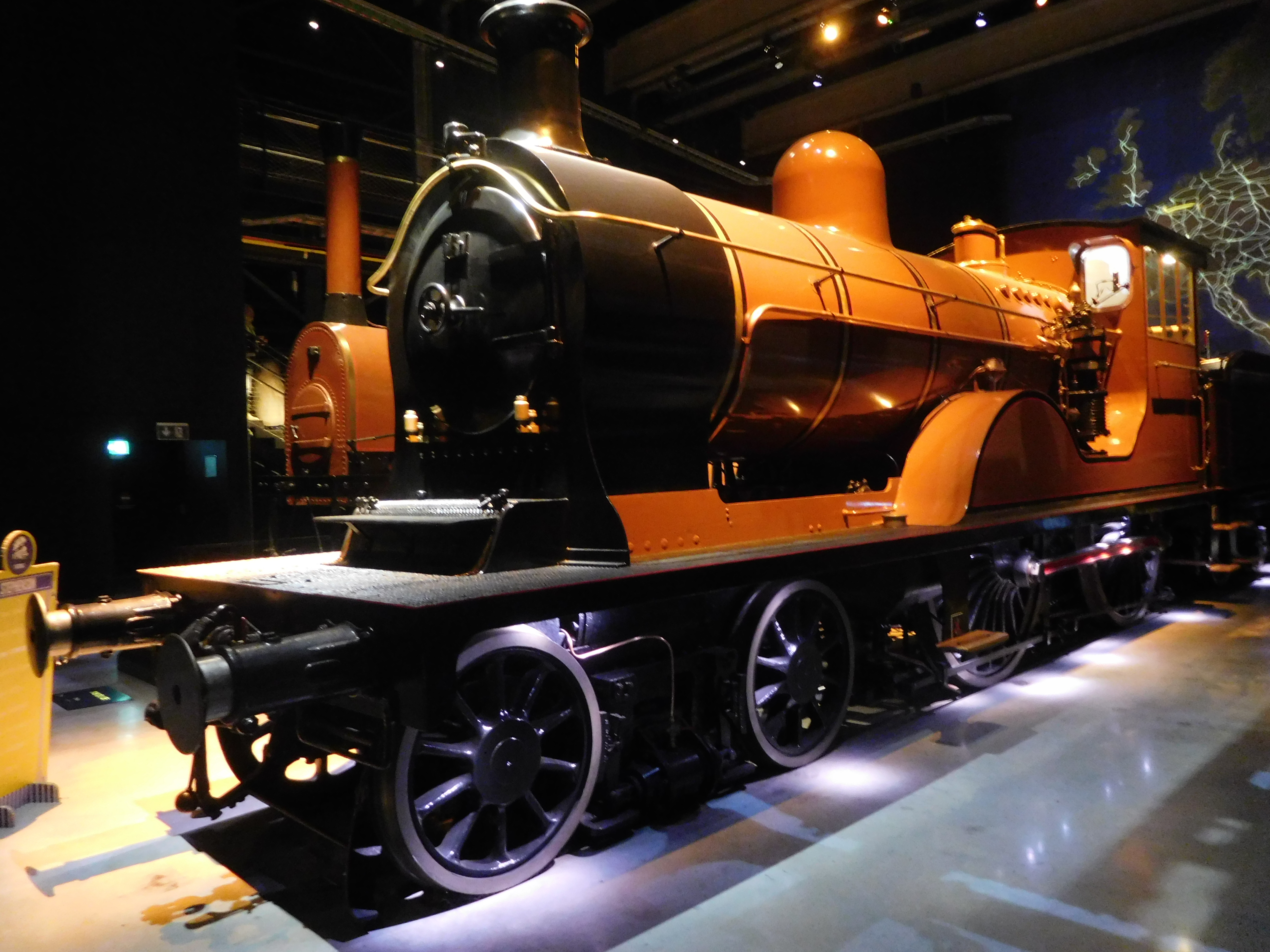 Locomotive 18.051 exposée à Train World